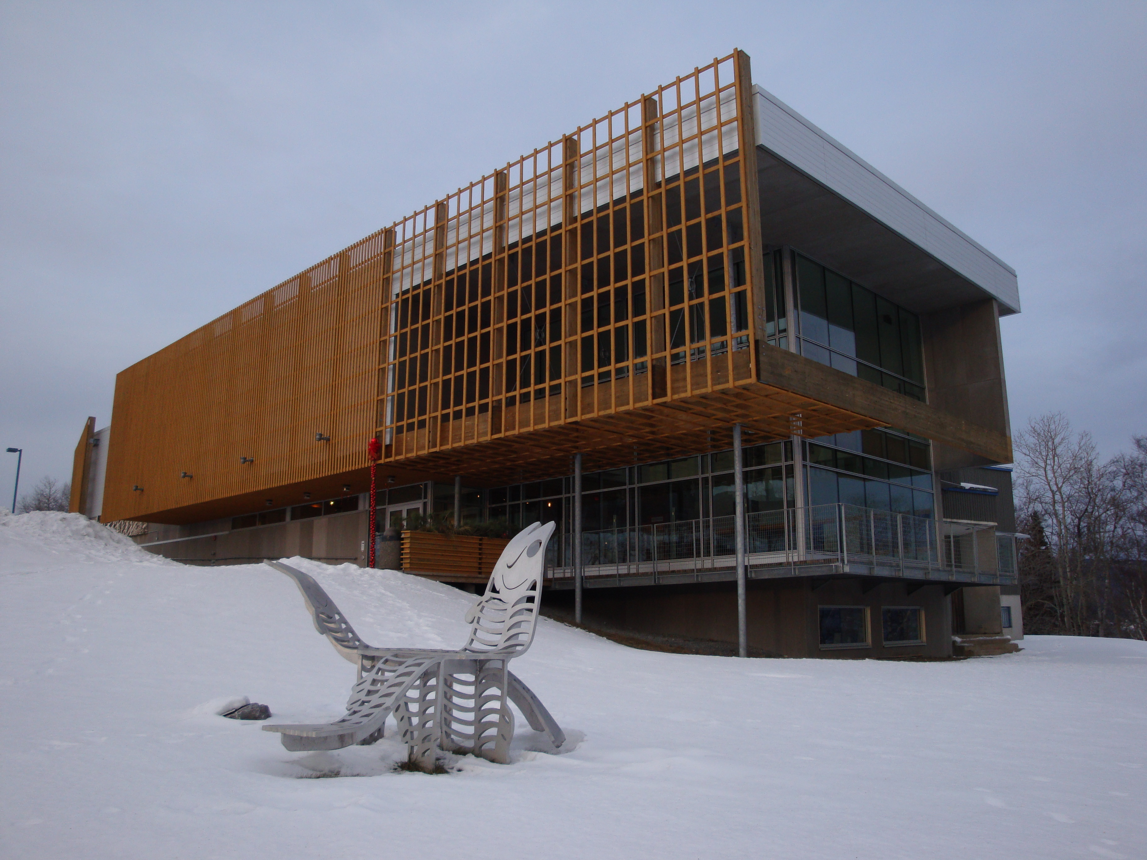 Musée de la Gaspésie en 2011